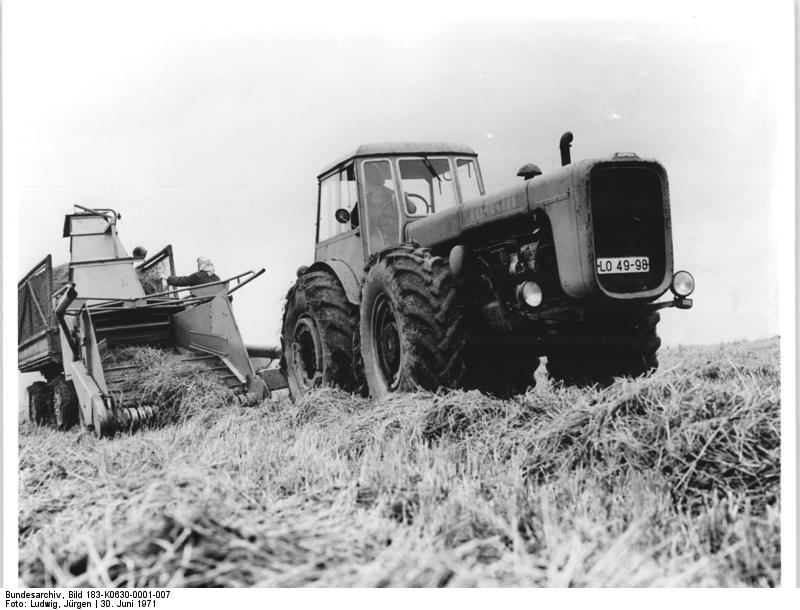 LPG Mihla, Grünfutterernte ADN-ZB -Bezirk Erfurt: Zusätzlich Futter für die Nordbezirke produzieren die Genossenschaftsbauern der LPG im Bezirk Erfurt. Allein die Bauern der LPG "Werratal" in Mihla, Kreis Eisenach, wollen 10 Tonnen Silage, 6 Tonnen Getreide und 3 Tonnen Kartoffeln für die Nordbezirke bereitstellen. Das bei ungünstiger Witterung auf Schwad gelegte Grünfutter wird mit D4K-Traktoren nach Besserung der Bodenverhältnisse geborgen. Die 10 Tonnen Silage wollen sie durch restlose Nutzung aller Grünflächen gewinnen.